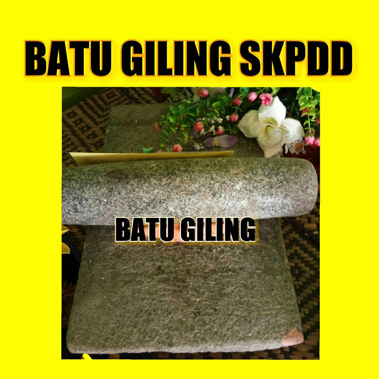 BatuGiling